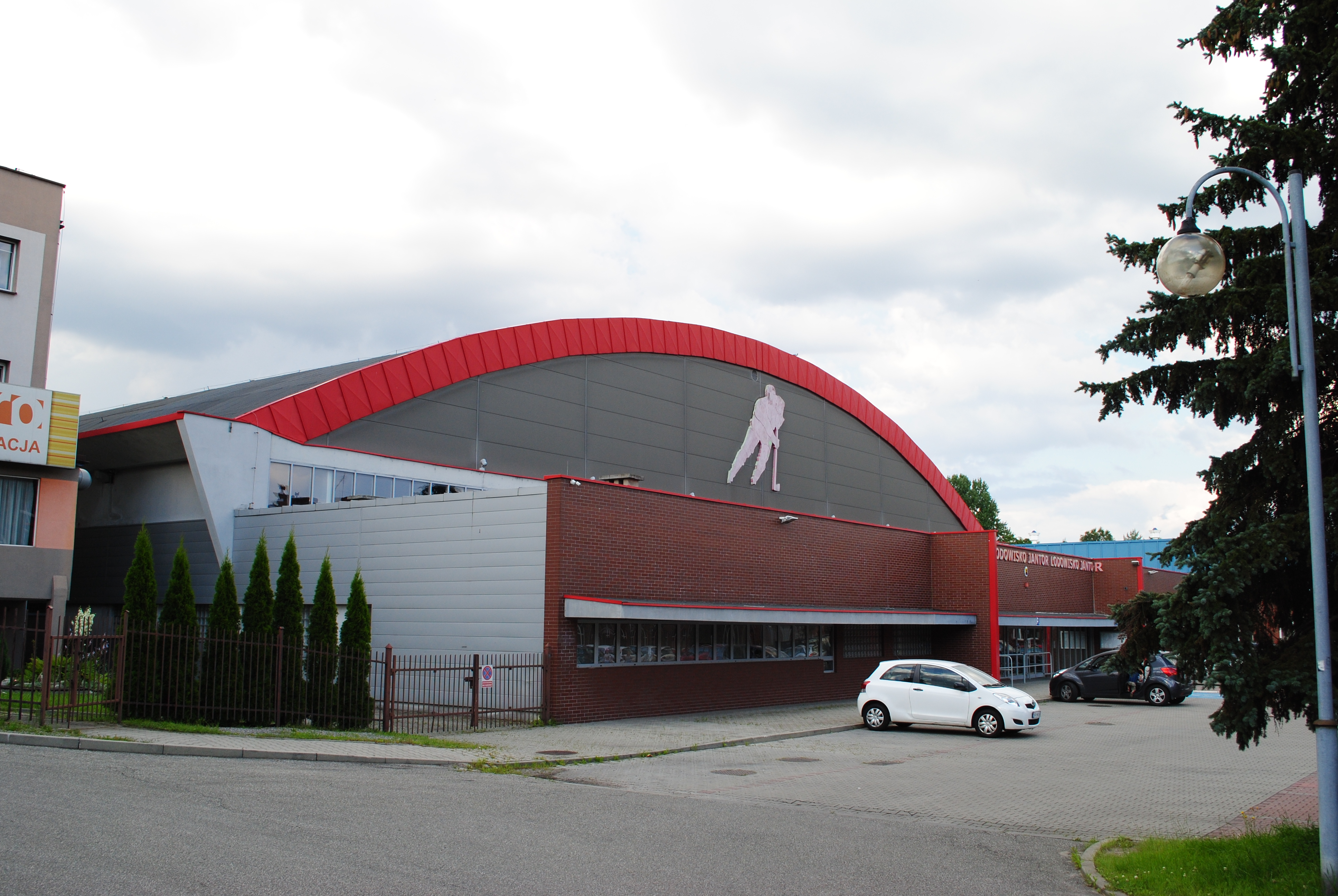 Katowice - Janów-Nikiszowiec. Lodowisko Jantor